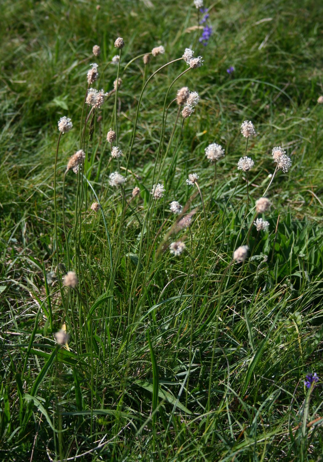 Plantago argentea, Wegerichgewächse (Plantaginaceae) - Italien/Italia/Italy: Friuli-Venezia Giulia, Prov. Trieste, Monte Cocusso